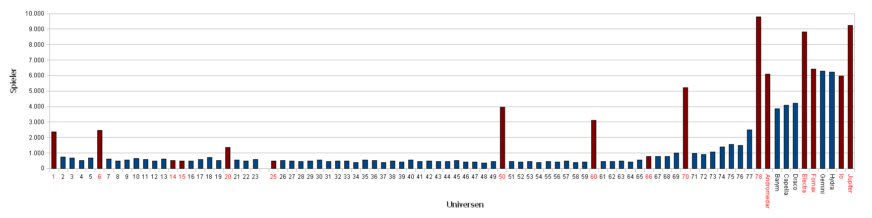 In diesem Diagramm sieht man die Universen von OGame.de im Bezug zu ihren Accountzahlen. Hier Besonderheiten der Universen (Uni), die besonders stark besucht sind: Uni 1: Erstes Uni Uni 6: Erstes Uni mit RD Uni 20: Uni ohne RD Uni 50: Mehr Sonnensysteme und Galaxien und doppelte Geschwindigkeit Uni 60: Doppelte Geschwindigkeit Uni 70: Doppelte Geschwindigkeit und 70% der Trümmer gehen ins Trümmerfeld Uni 78: Letztes Uni ohne RD im Spielprinzip Uni Andromedar: Erstes reguläres Uni mit RD Uni Elektra: Vierfache Geschwindigkeit und 50% der Trümmer gehen ins Trümmerfeld Uni Fornax: Doppelte Geschwindigkeit Uni Jupiter: Kein Allianzkampfsystem und 30% der Trümmer gehen ins Trümmerfeld